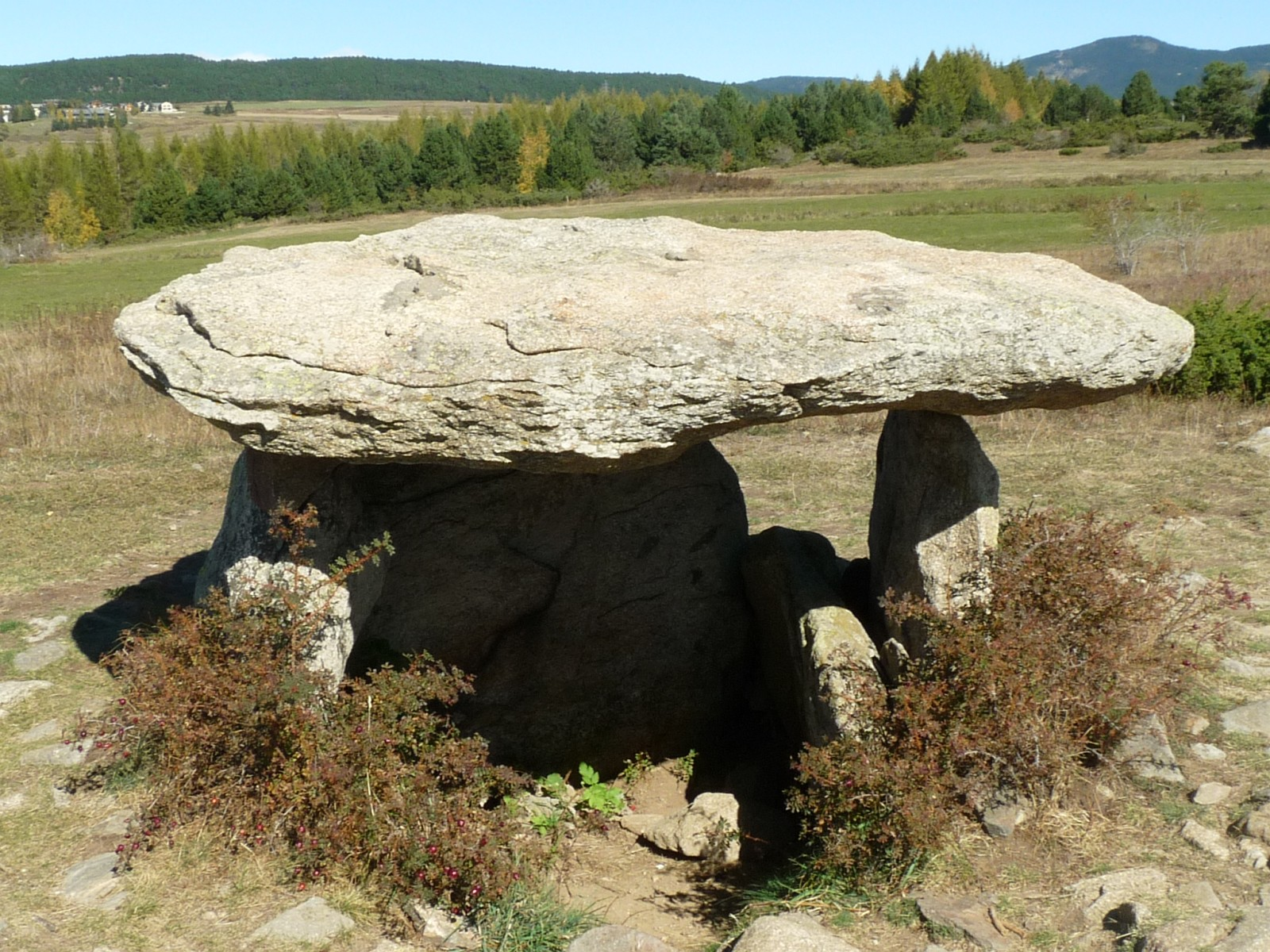 Dolmen d'Eyne, Pyrénées-Orientales, France